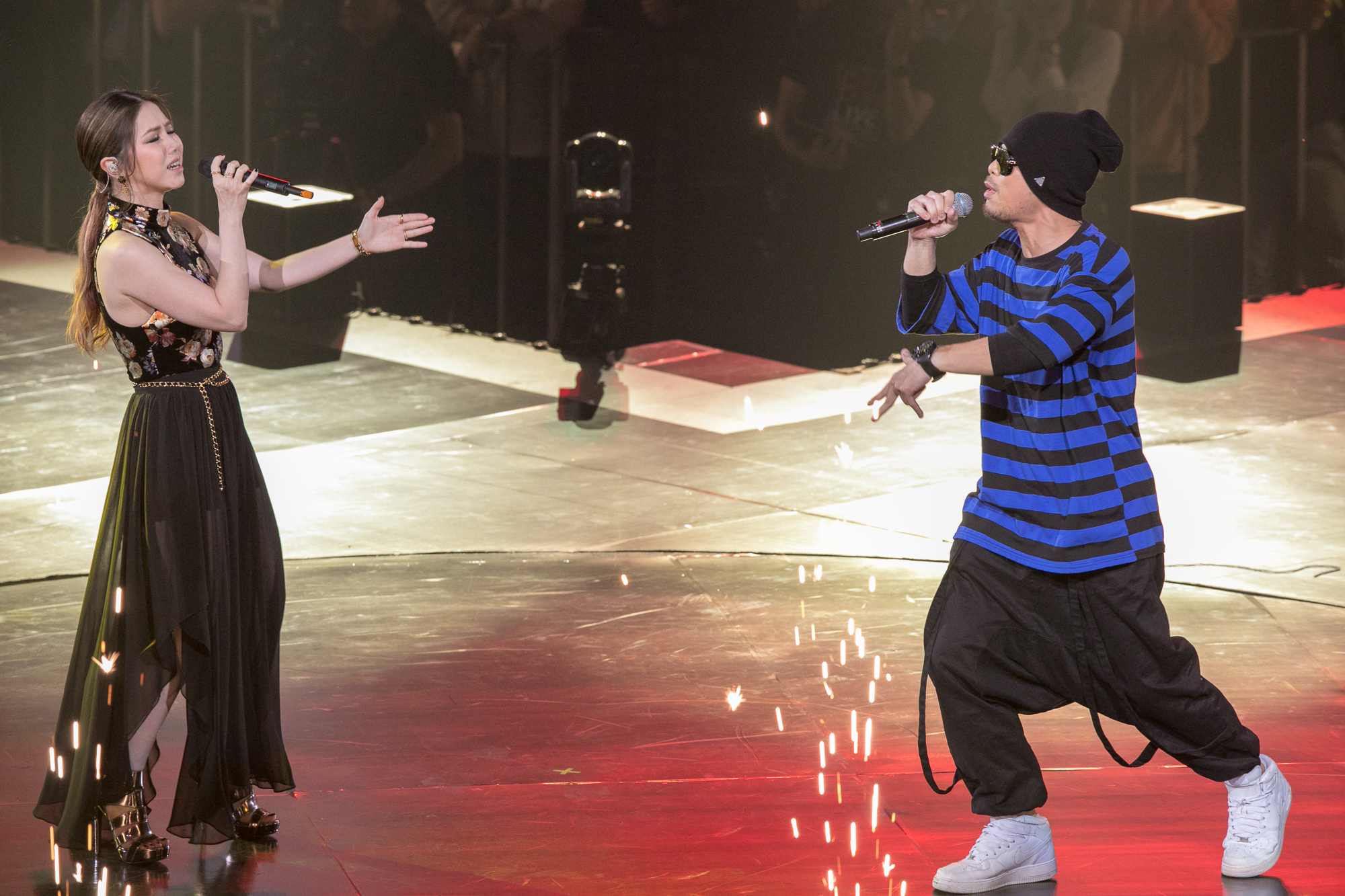 中文（台灣）: 第十三屆 KKBOX 風雲榜－鄧紫棋、黃明志合唱漂向北方